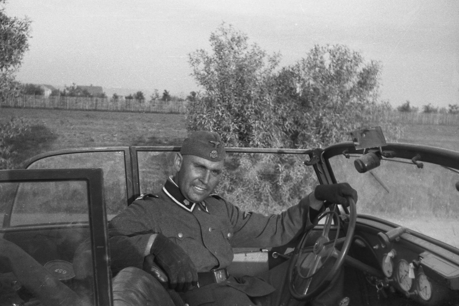 SS Panzerdivision Totenkopf Deutsch-Sowjetischer Krieg -Heinz Flessner